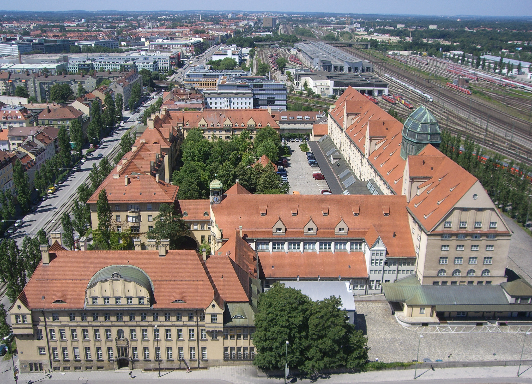 München - ehem. Hauptzollamt